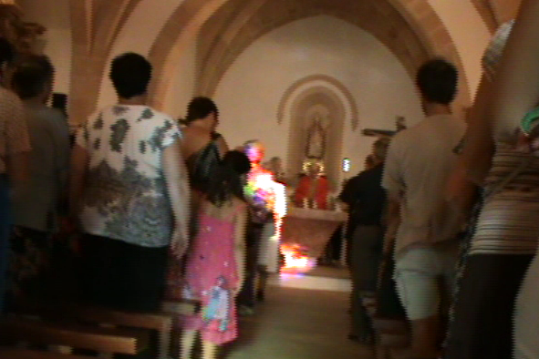 Aquesta imatge és d'una missa que es va dir a l'oratori de Sant Blai a Campos, Mallorca, dia 4 de setembre de 2011